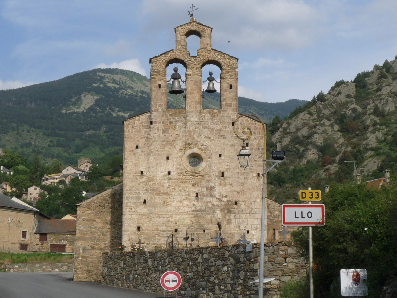 Eglise de Llo, Pyrénées-Orientales, France